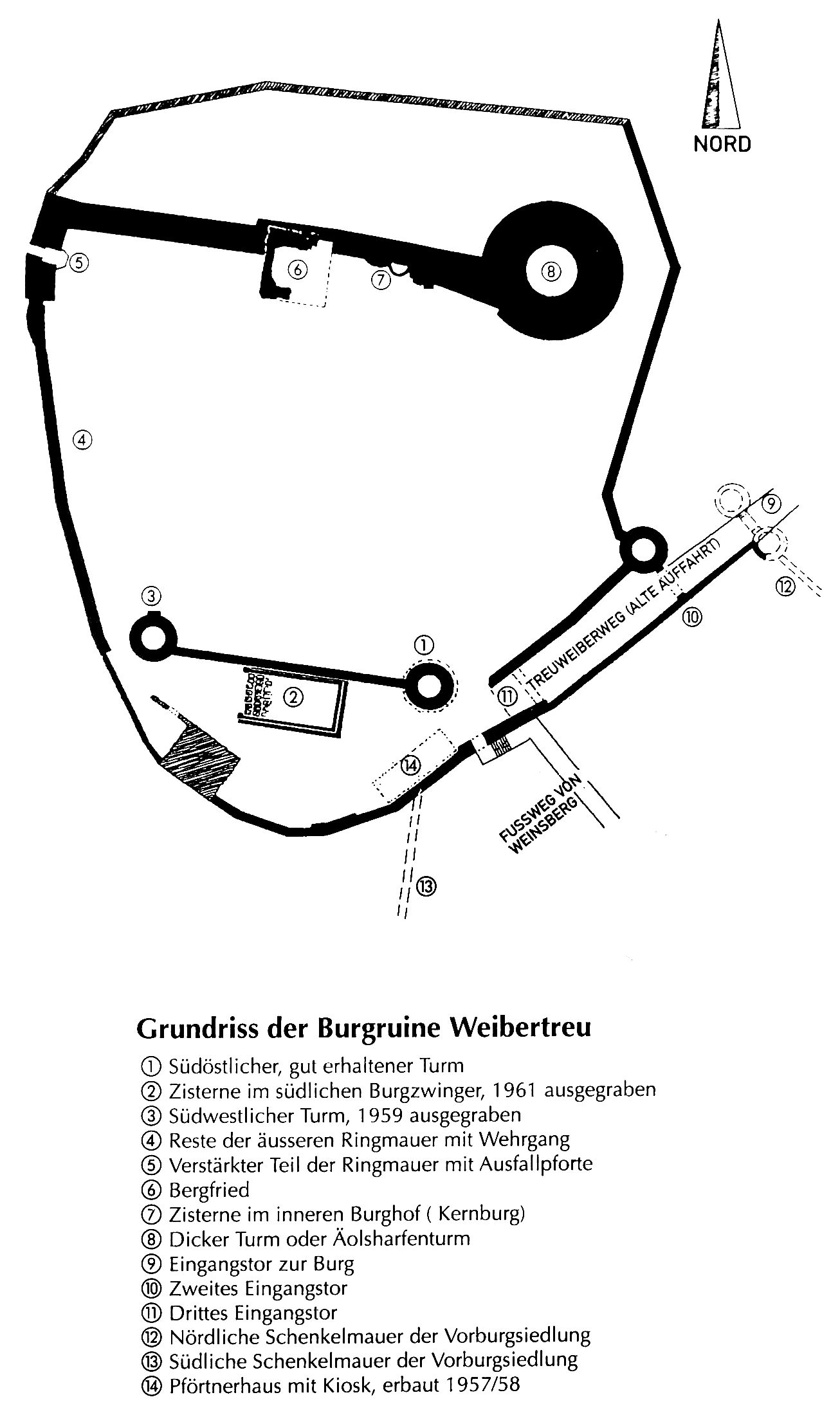 Lageplan der Burgruine Weibertreu. Selbst fotografiert am 15. März 2005; GNU-FDL